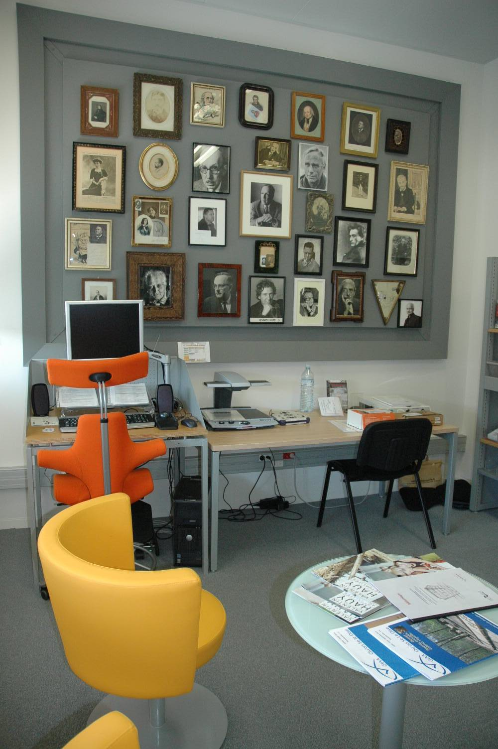 Bibliothèque des Champs Libres